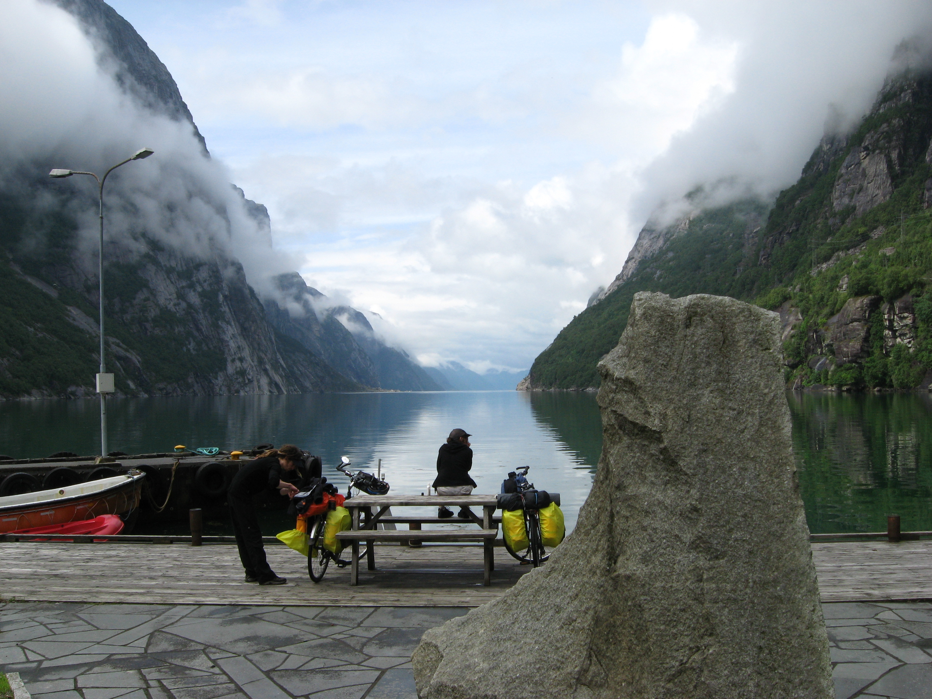 Author: Steffen Mikkelsen